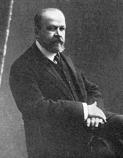 Мясоедов Николай Александрович